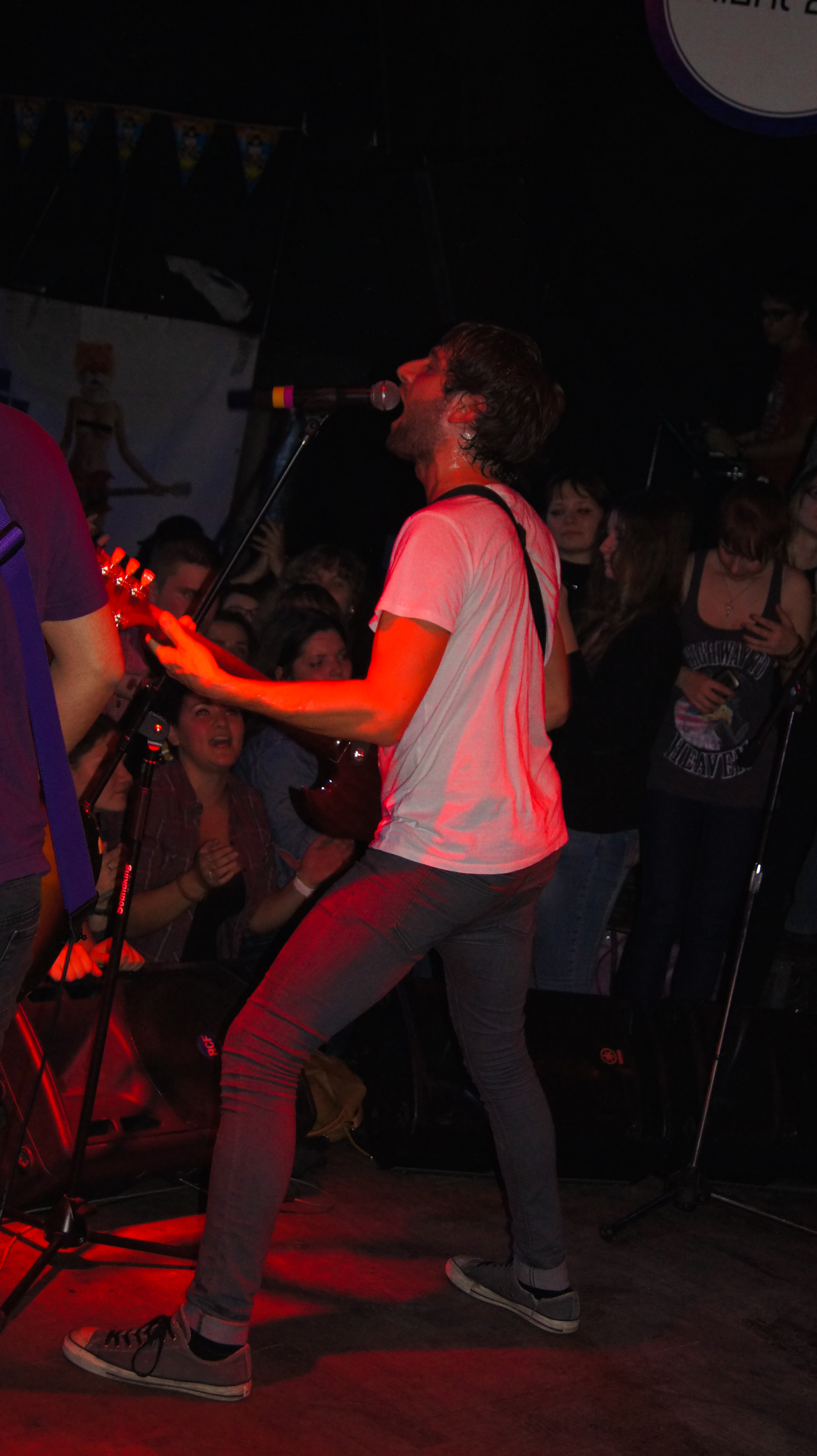 Выступление группы Vanilla Sky в Самаре 26 октября 2012 года.